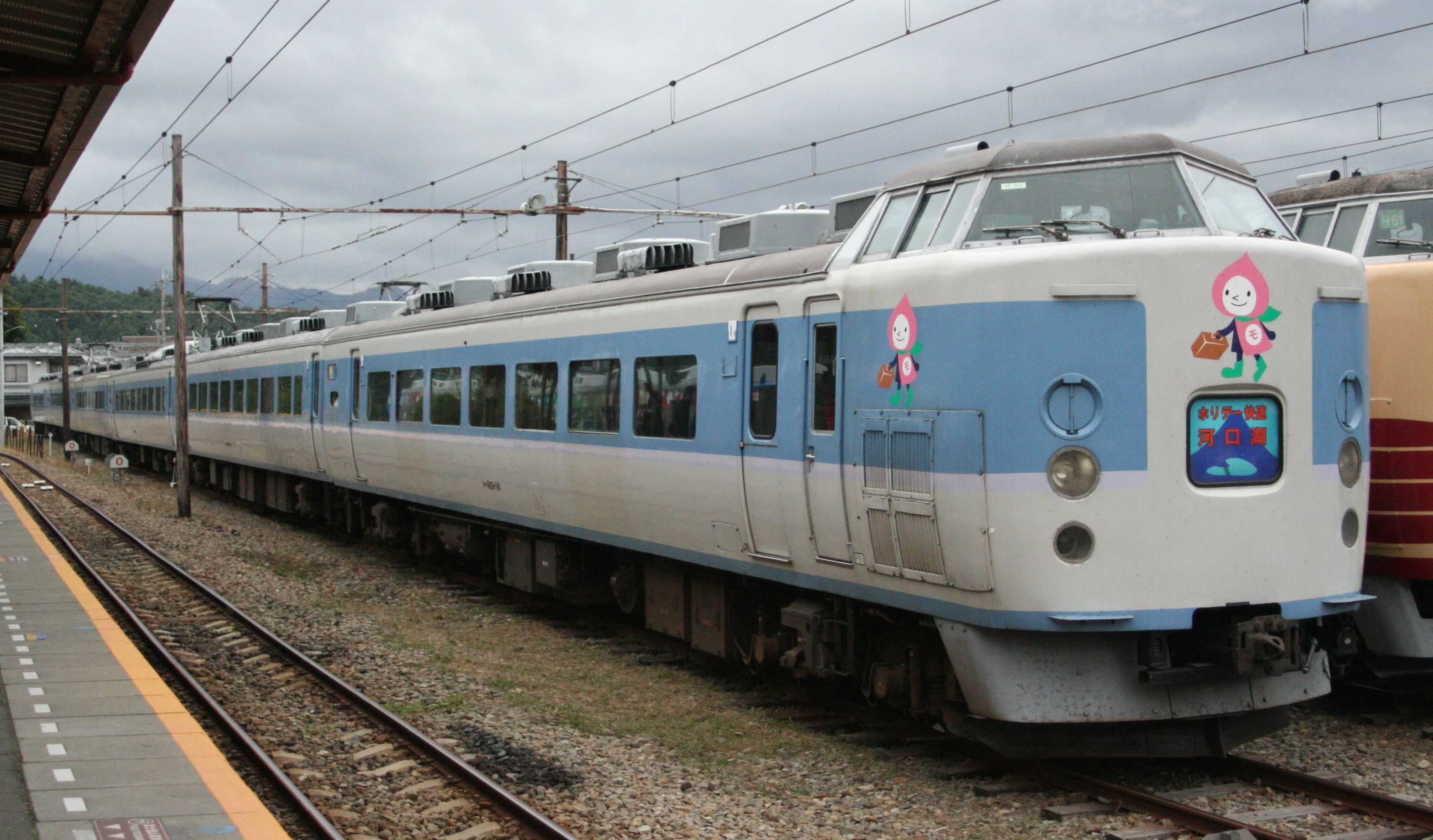 JR東日本 189系 M50編成